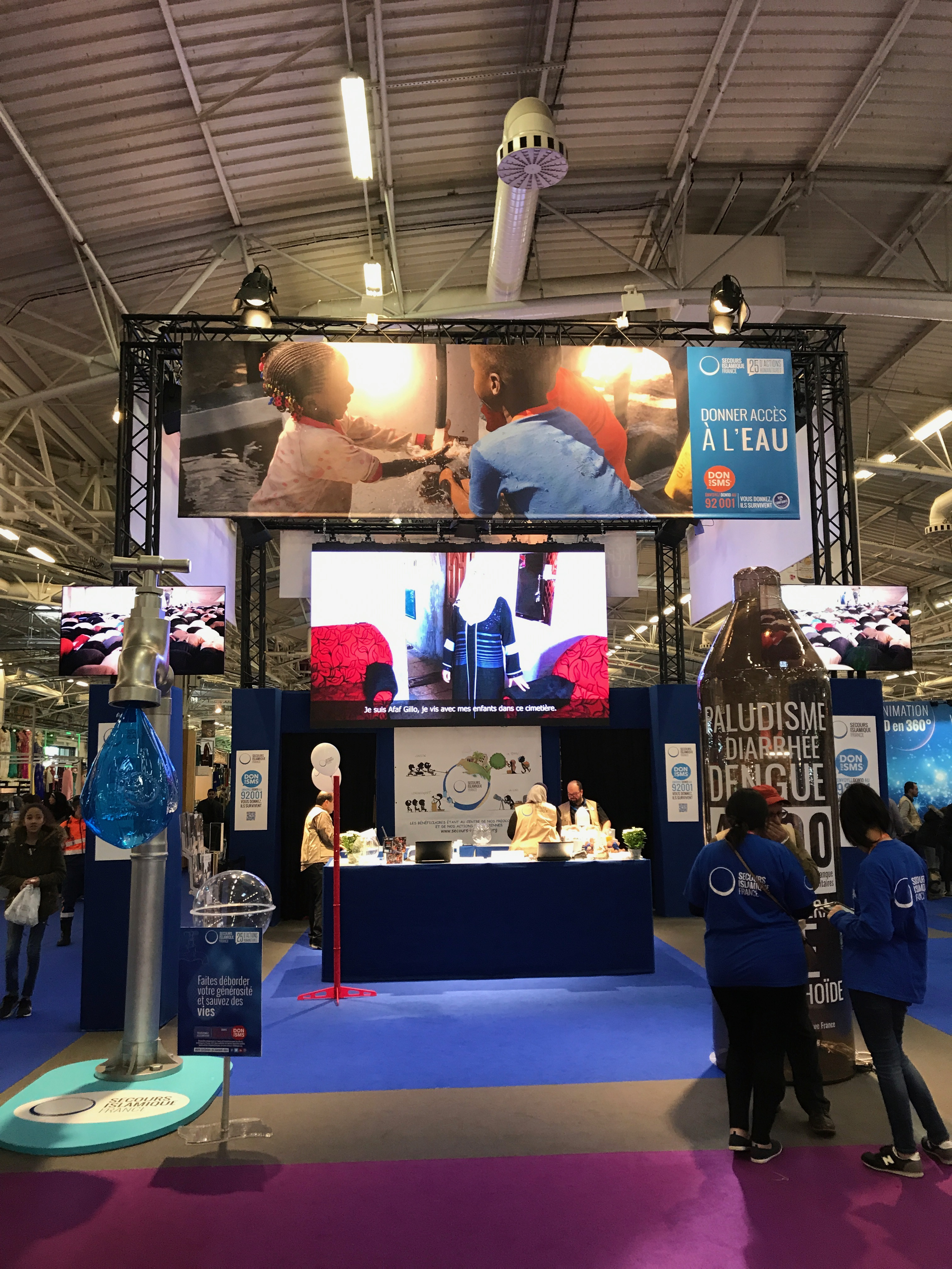 Stand Secours Islamique France, Rencontre annuelle des musulmans de France, avril 2017, Paris Le Bourget.